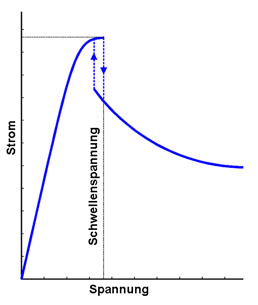 Kennlinie einer Gunn-diode mit Hysterese